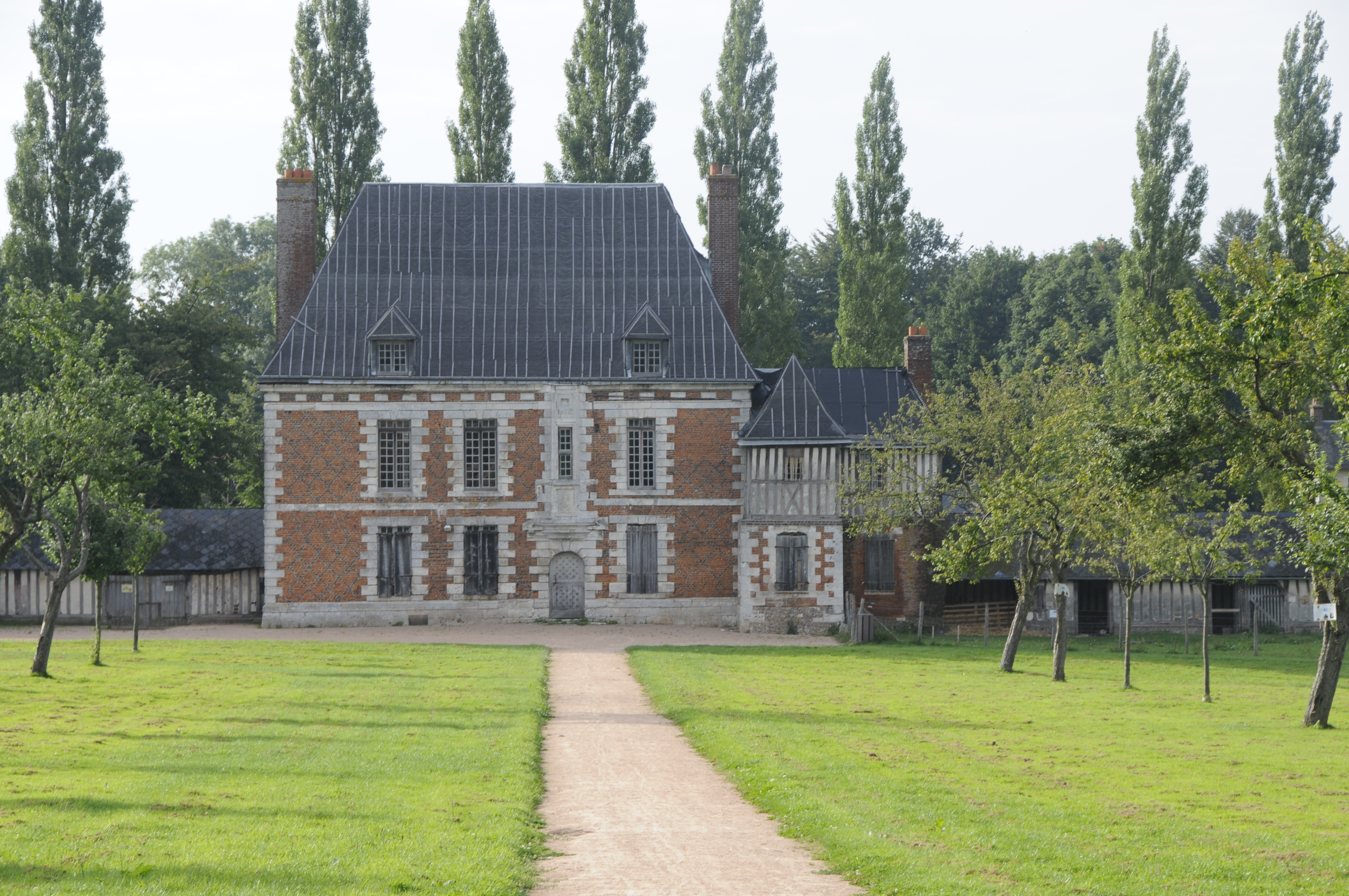 Manoir du Fay, Rue du Grand-Fay (InscritClassé, 19941996) .